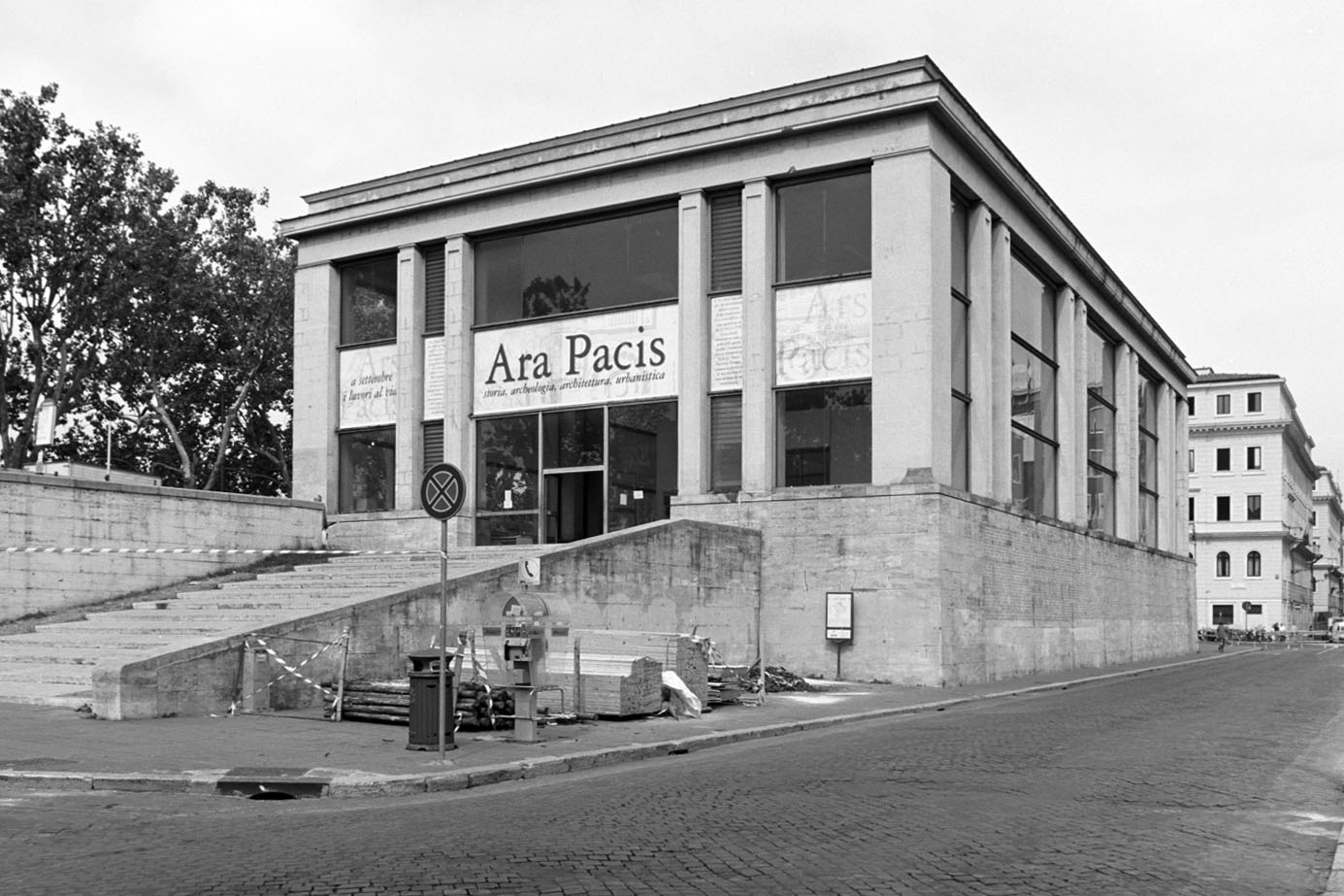 Ara Pacis - La vecchia teca di Morpurgo dopo la riverniciatura di bianco degli anni '50 er il ripristrino delle vetrate del 1970. Originariamente la teca era in finto porfido rosso.